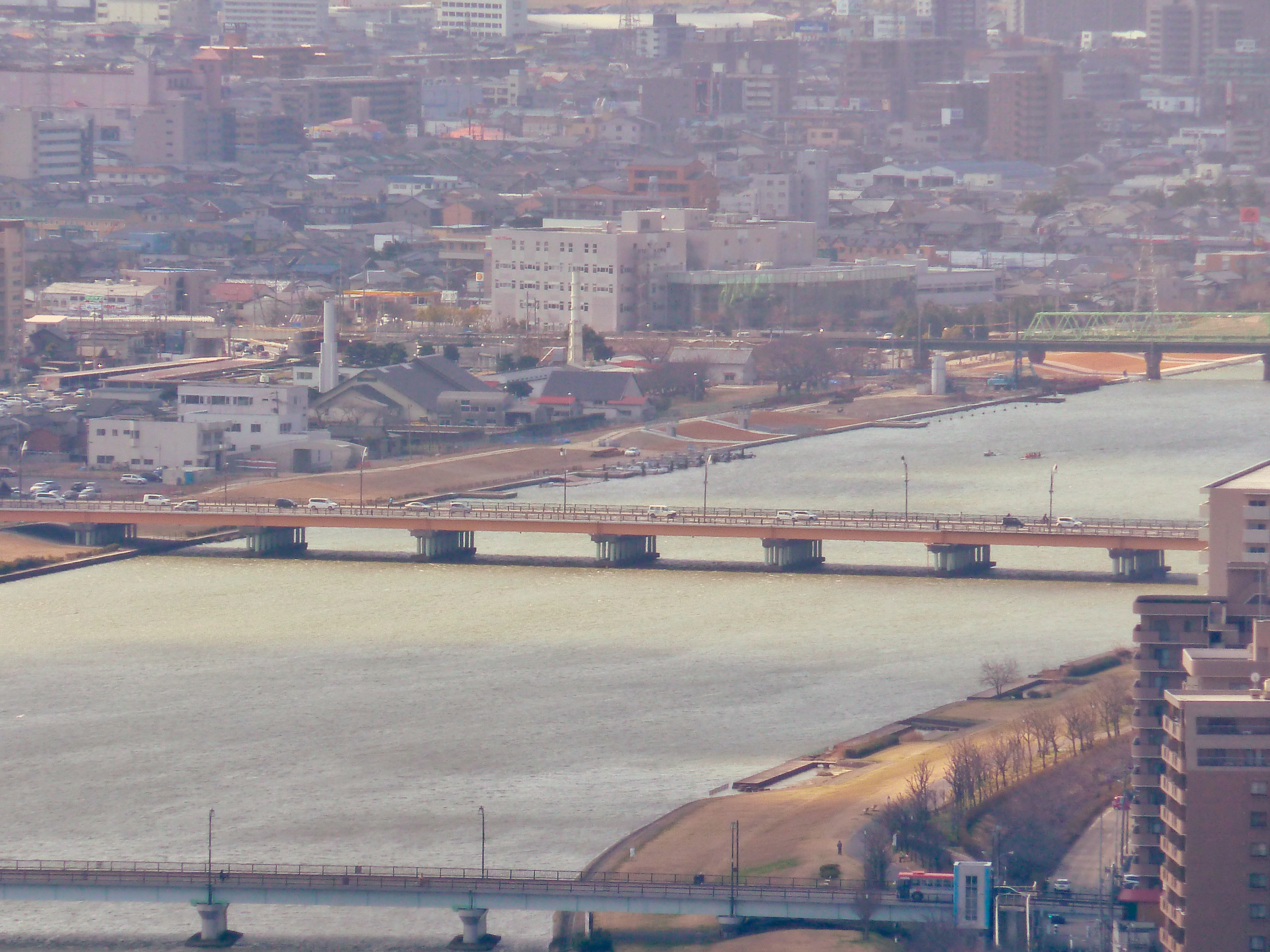 昭和大橋風景